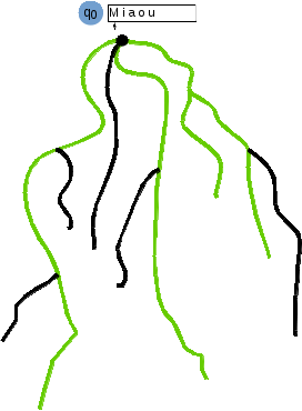 L'image montre 3 exécutions acceptantes depuis le mot "miaou".